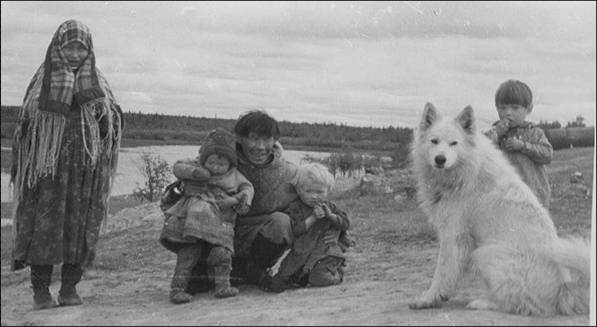 Самоед в естественной среде